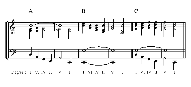 Description : Pédale Source : Personnelle Licence : GFDL